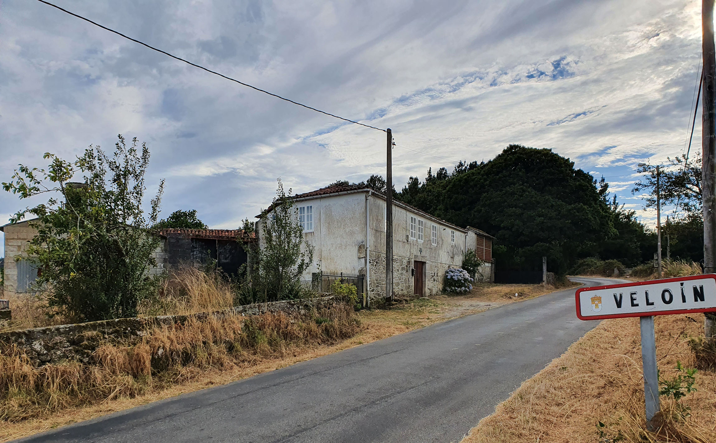 Lugar de Veloín, da parroquia de Arcos en Antas de Ulla.